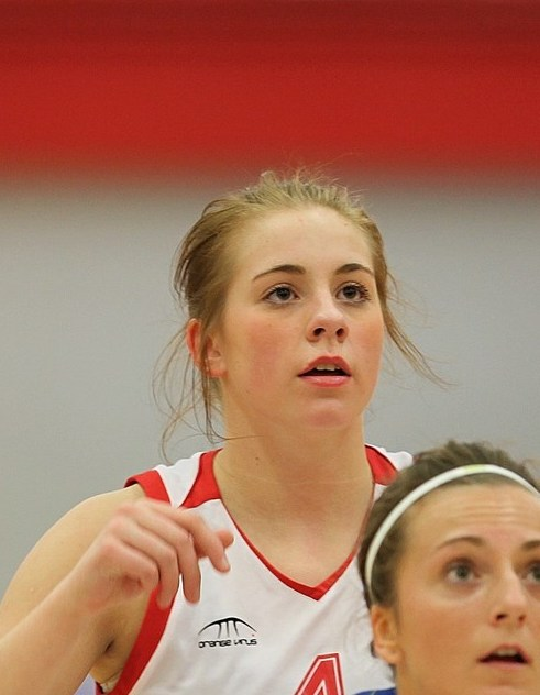 Haukar's Guðbjörg Sverrisdóttir (4) And Grindavík's Jovana Lilja Stefánsdóttir (9)